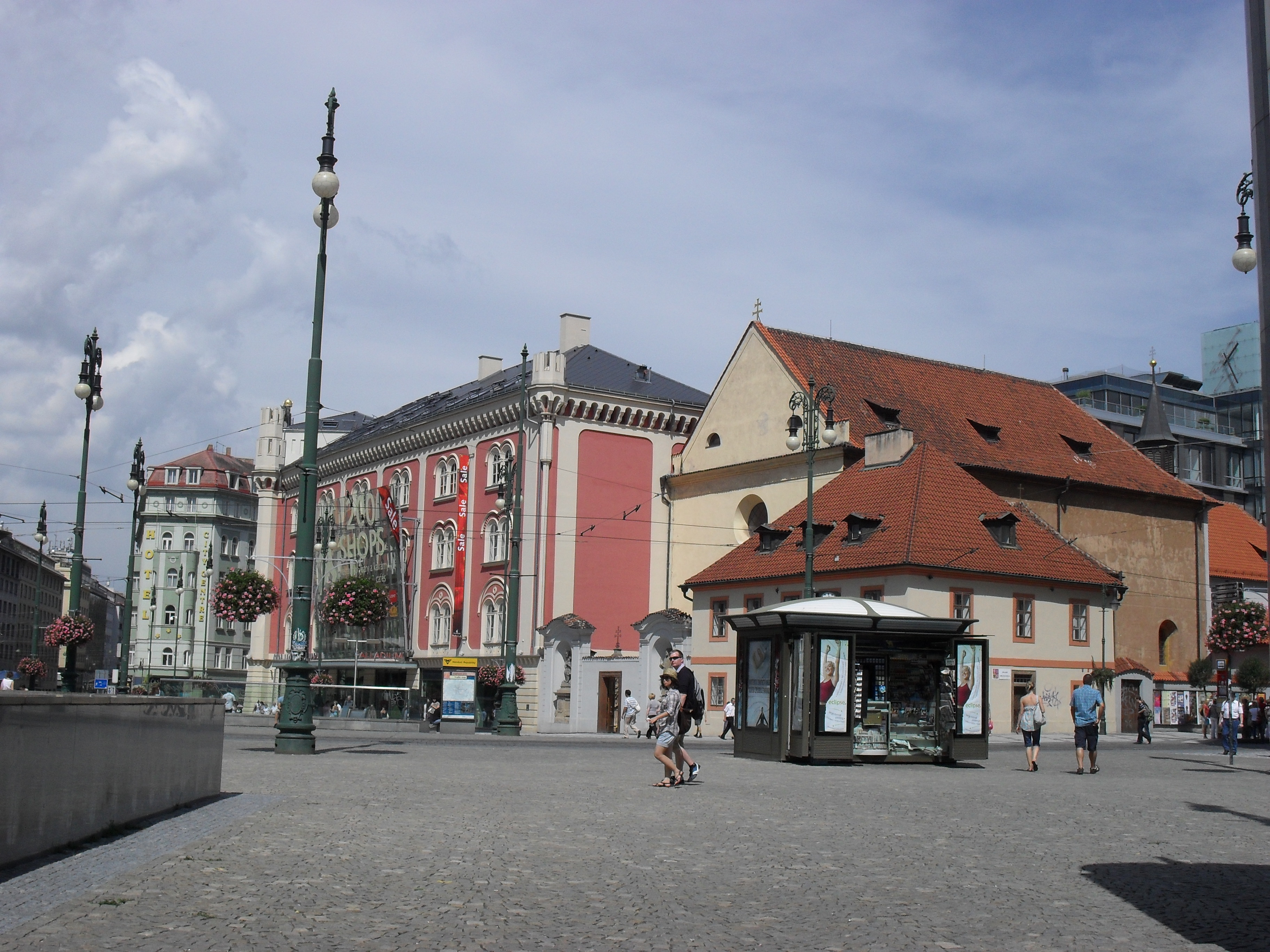 Pohled na obchodní centrum Palladium a kostel svatého Josefa na náměstí Republiky v Praze.